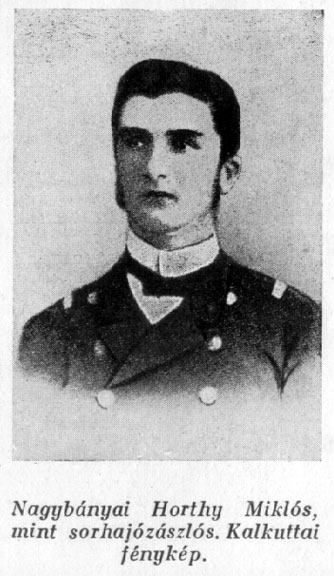 Horthy Miklós